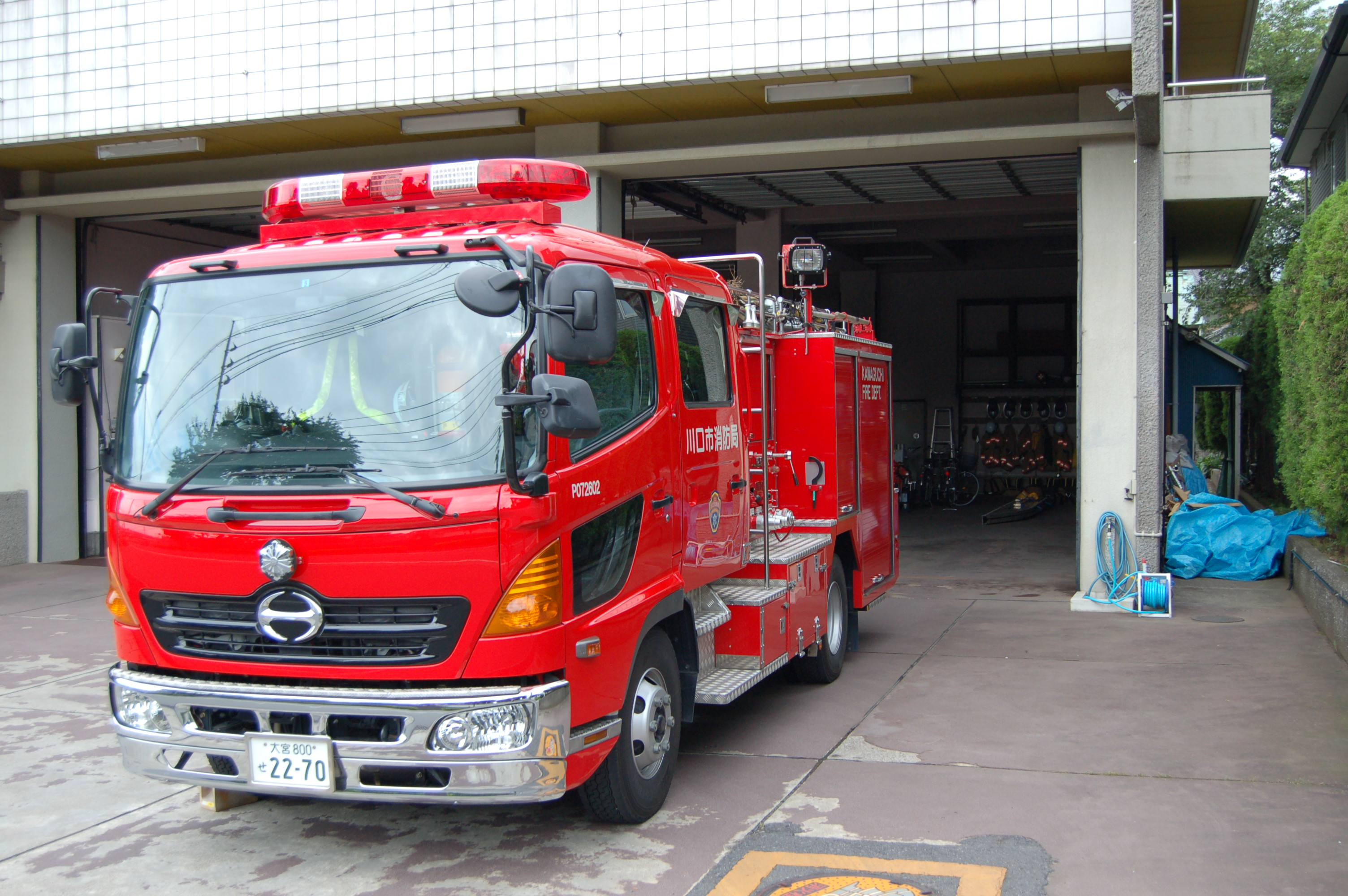 川口市消防局北消防署戸塚ポンプ1